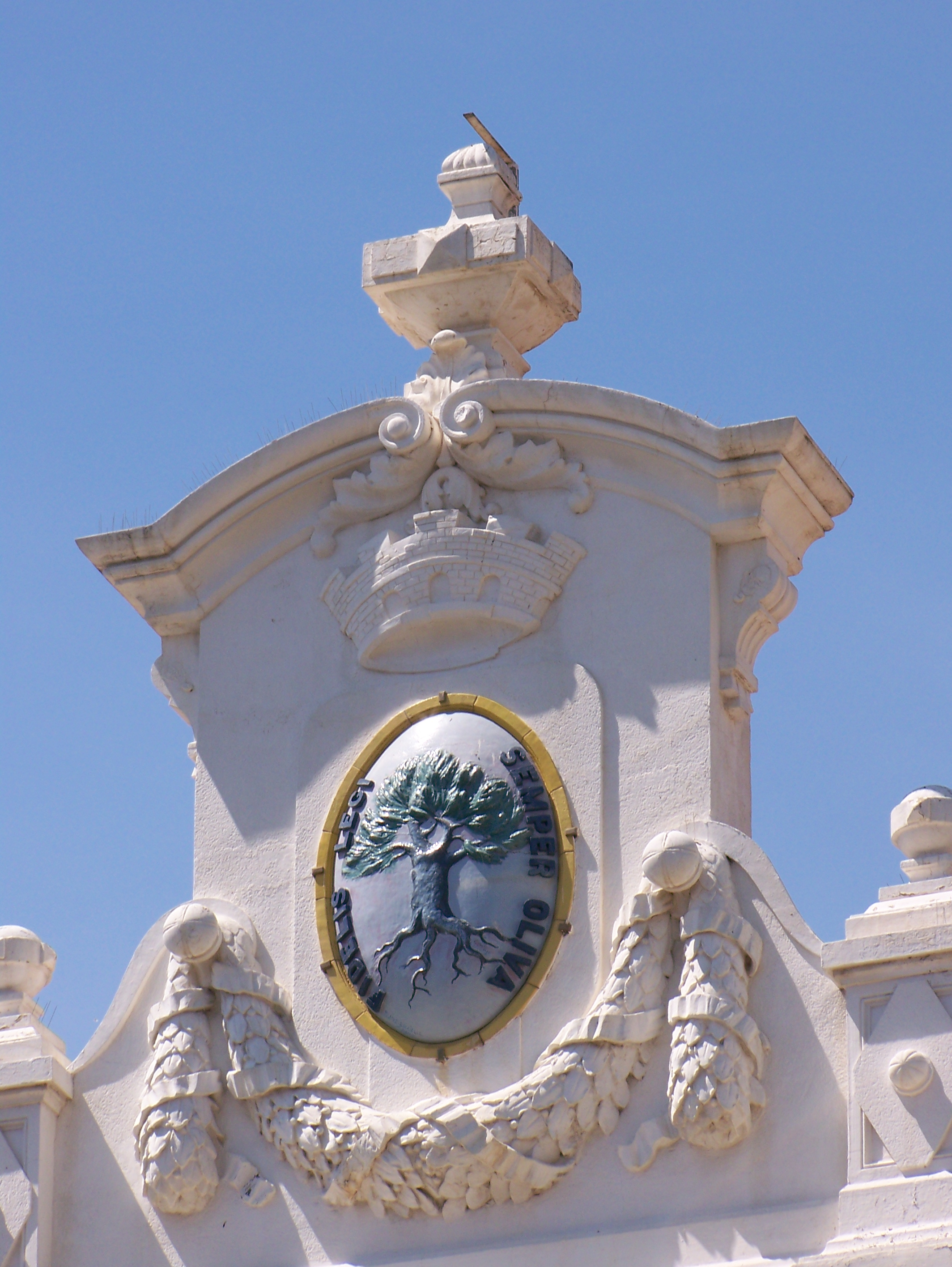 Blason de la ville d'Ollioules représentant un Olivier (toit de la mairie). Ænglisc: Blason of the City of Ollioules representing Olivier (roof of the hall).